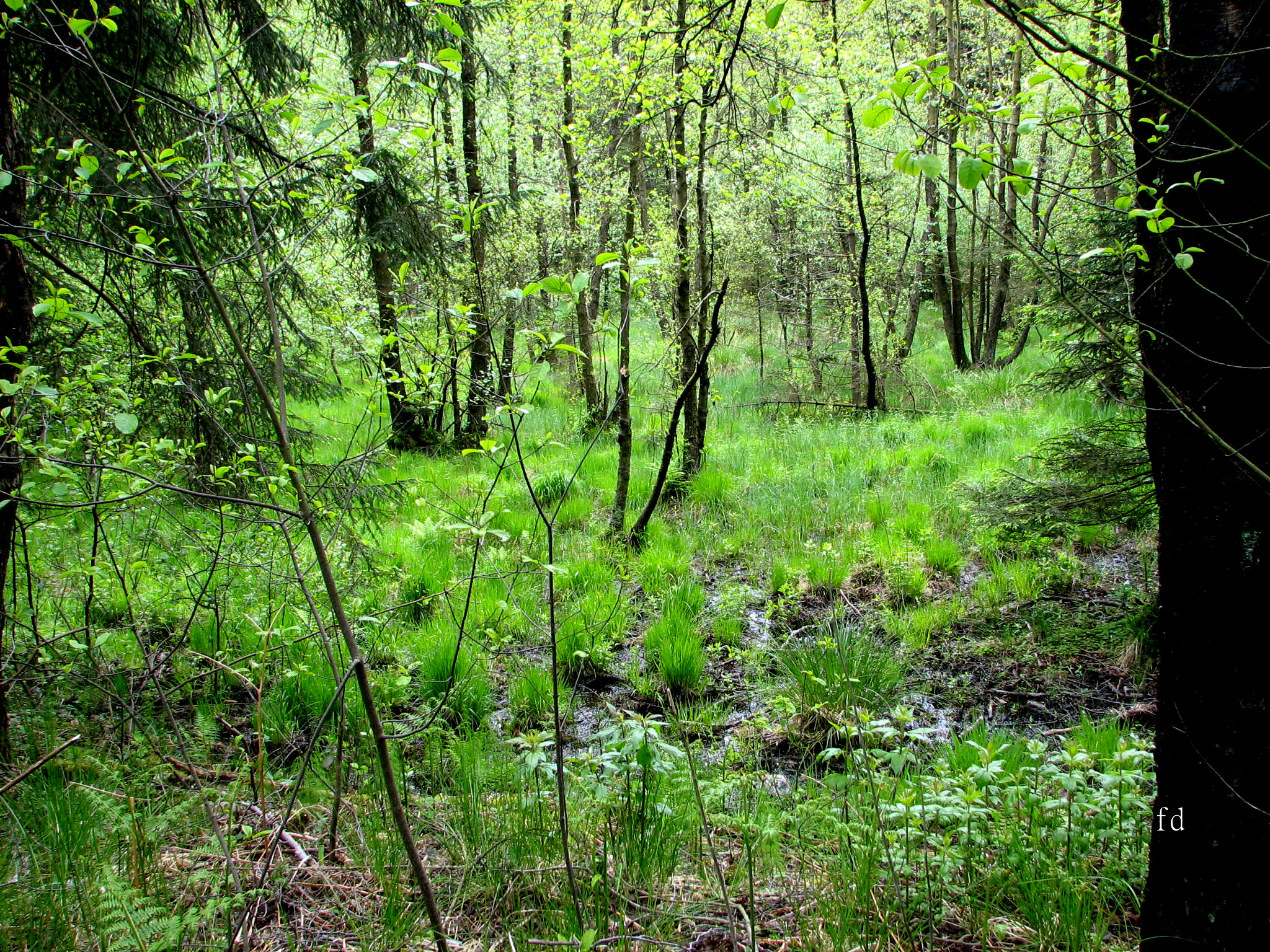 Lörmecketal nordöstlich von Eversberg, Naturschutzgebiet Lörmecketal (NSG HSK-146) in Meschede